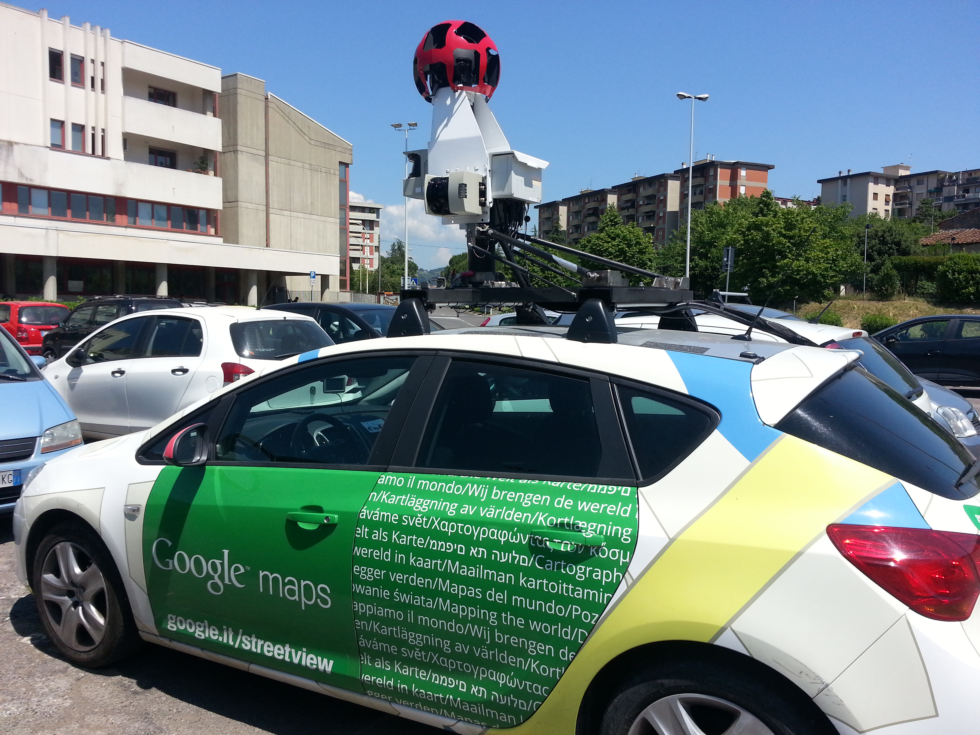 google car